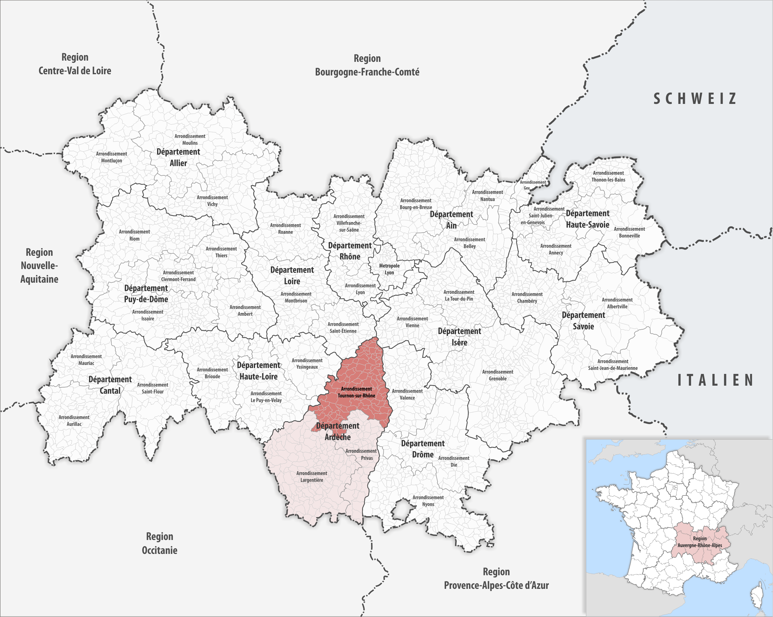 Lage des Arrondissements Tournon-sur-Rhône